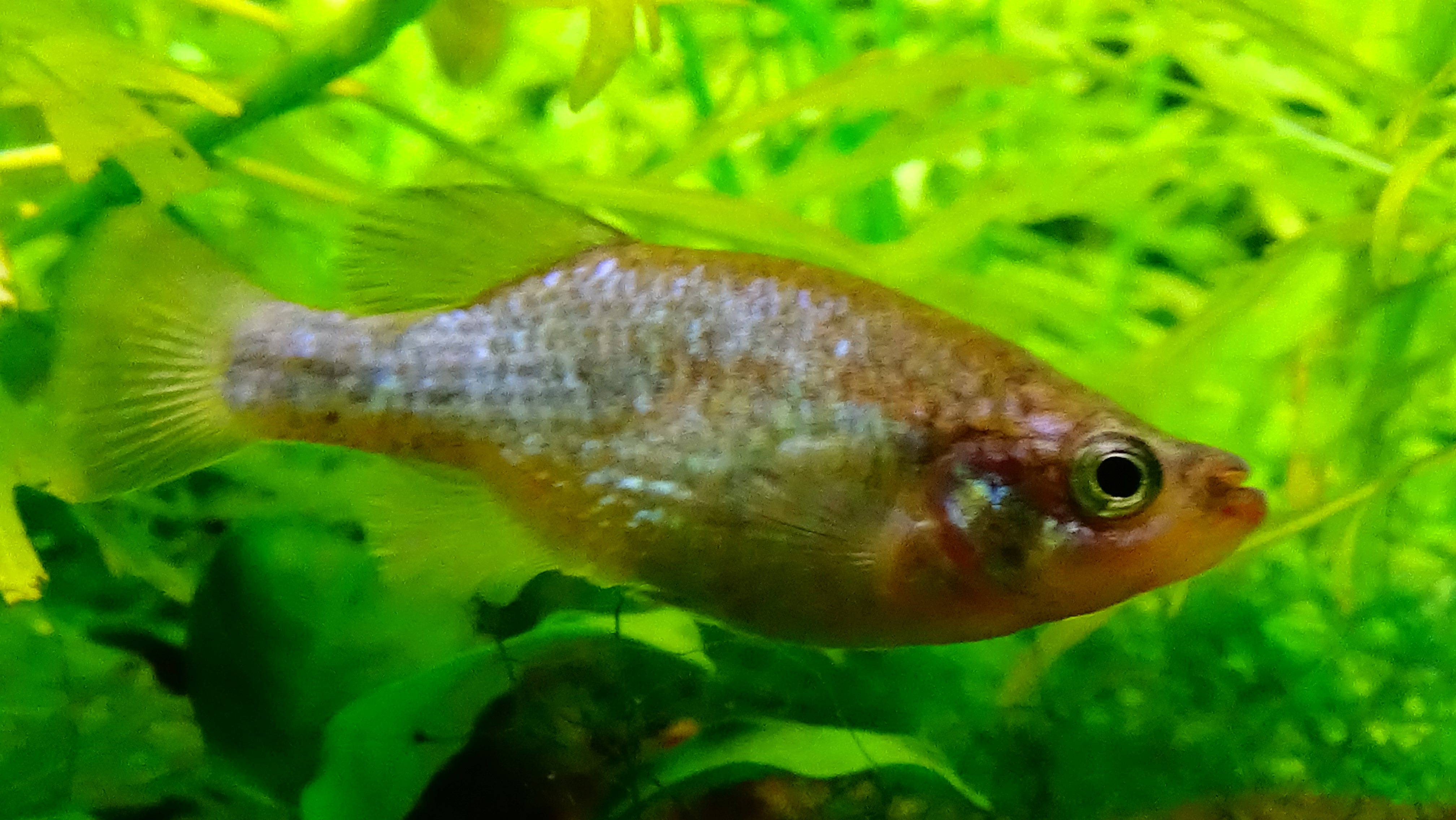 Xenoophorus captivus - Aquarium Tropical du Palais de la Porte Dorée Paris/France - 04/2015